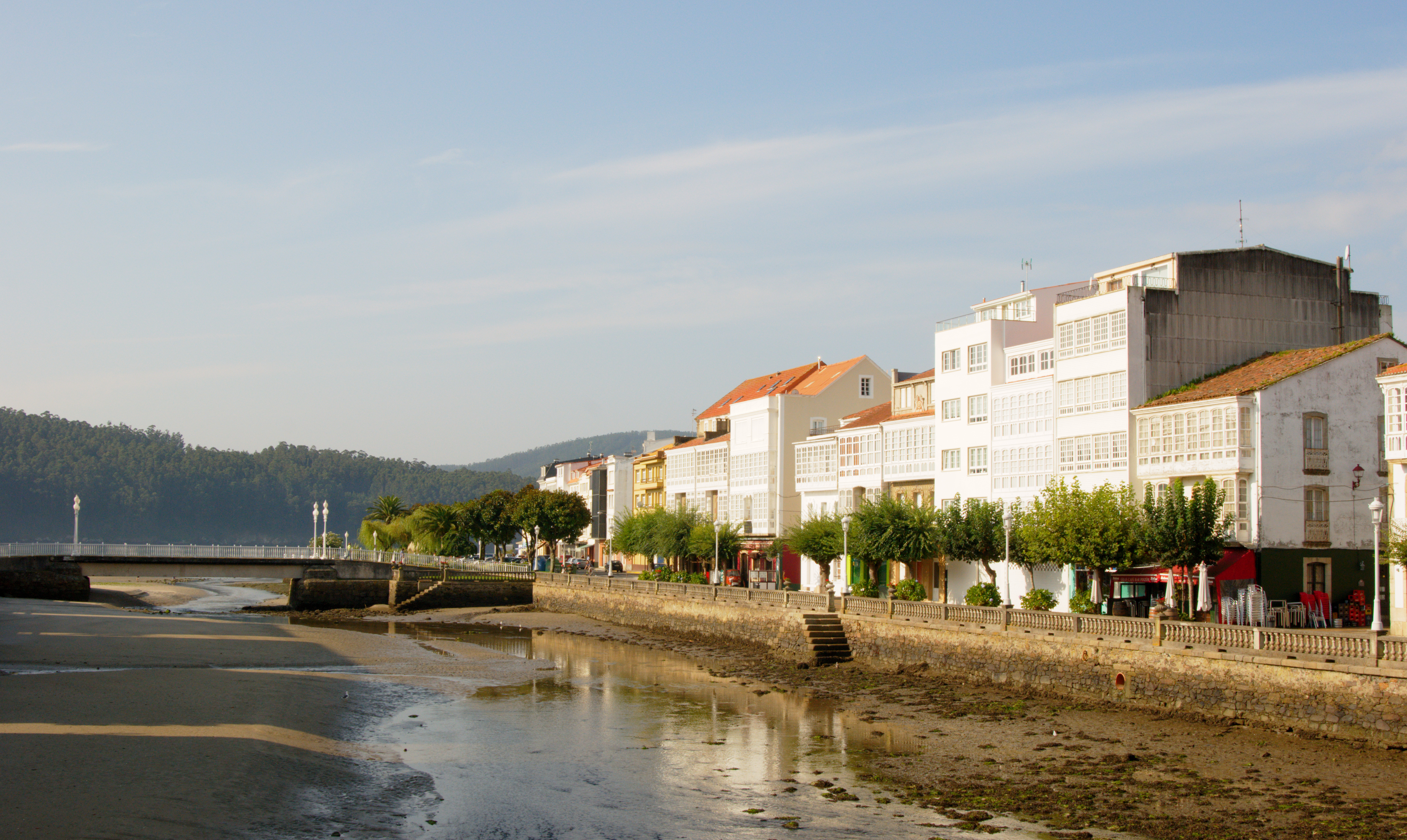 Uferpromenade, Cedeira, Galicien